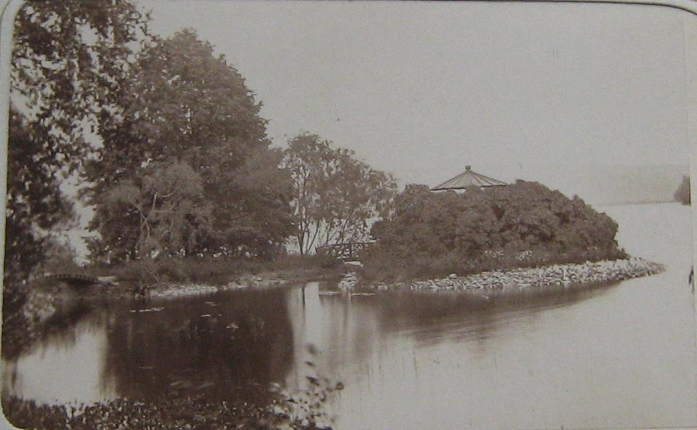 Fotografi, 1860-tal. Baldersnäs